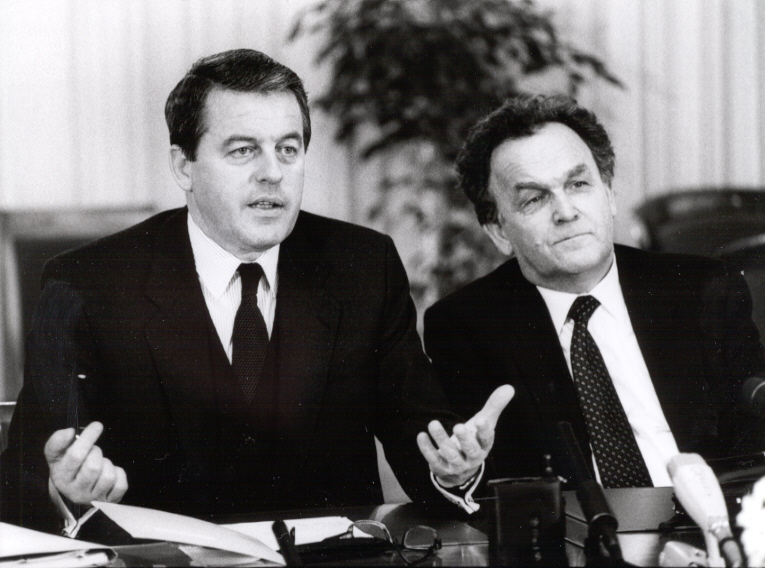 Franz Vranitzky, österreichischer Bundeskanzler und Otto Stich, Schweizer Bundesrat (von links nach rechts)